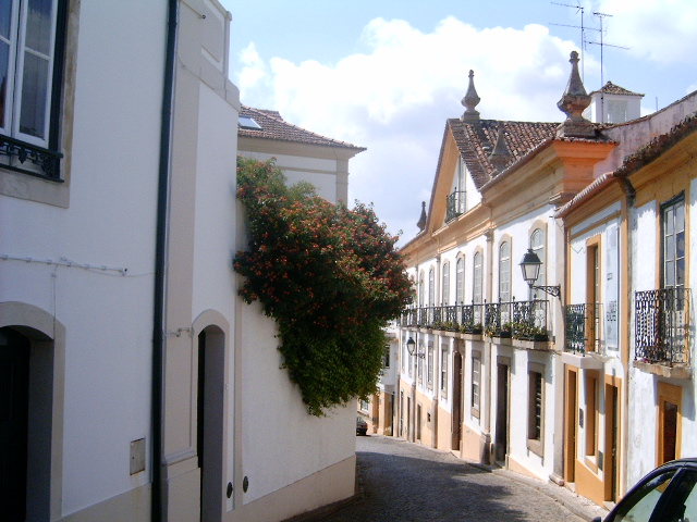 Rua típica de Abrantes, Portugal